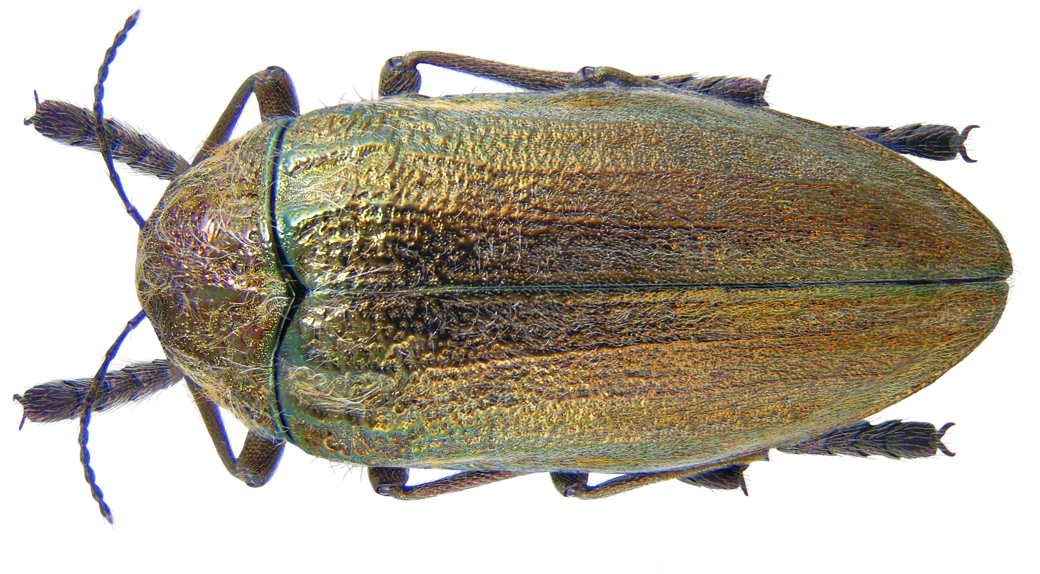 Familie: Buprestidae Grösse: 25 mm Fundort: Türkei, Prov. Mersin, Aydincik leg. A.Skale, 2002; det. M.Niehuis, 2002 Foto: U.Schmidt, 2009